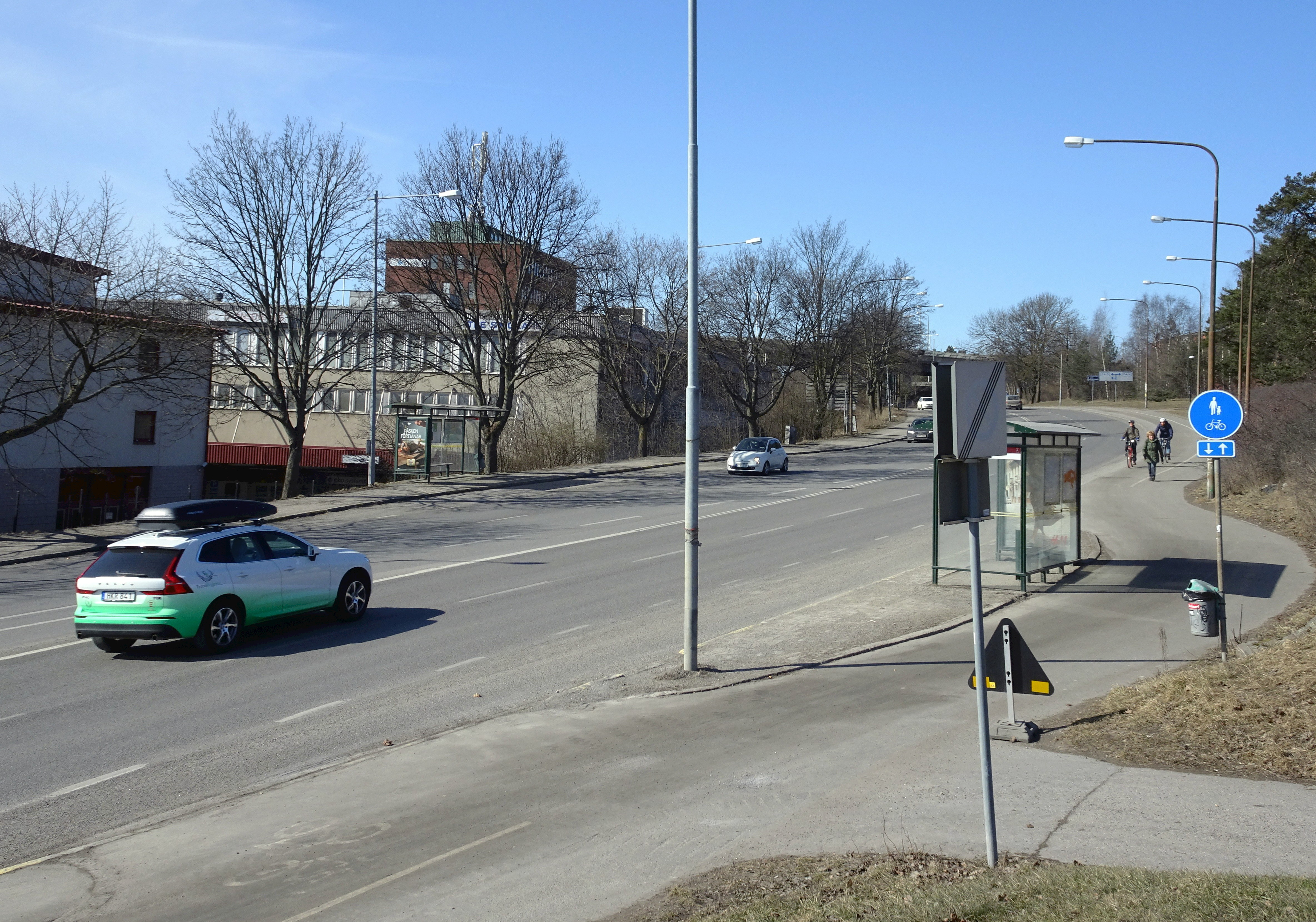 Årstabergsvägen